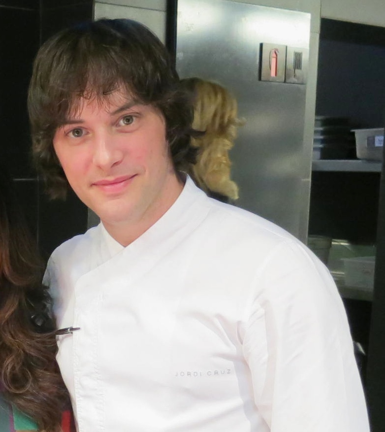 ABaC Restaurant & Hotel Chef : Jordi Cruz Avinguda del Tibidabo, 1 Barcelona 933 19 66 00